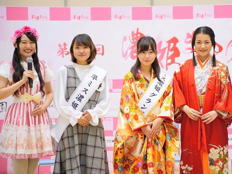 2019年11月23日 マーサ21会場において